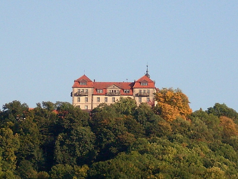 Schloss Bieberstein, von Langenbieber aus gesehen